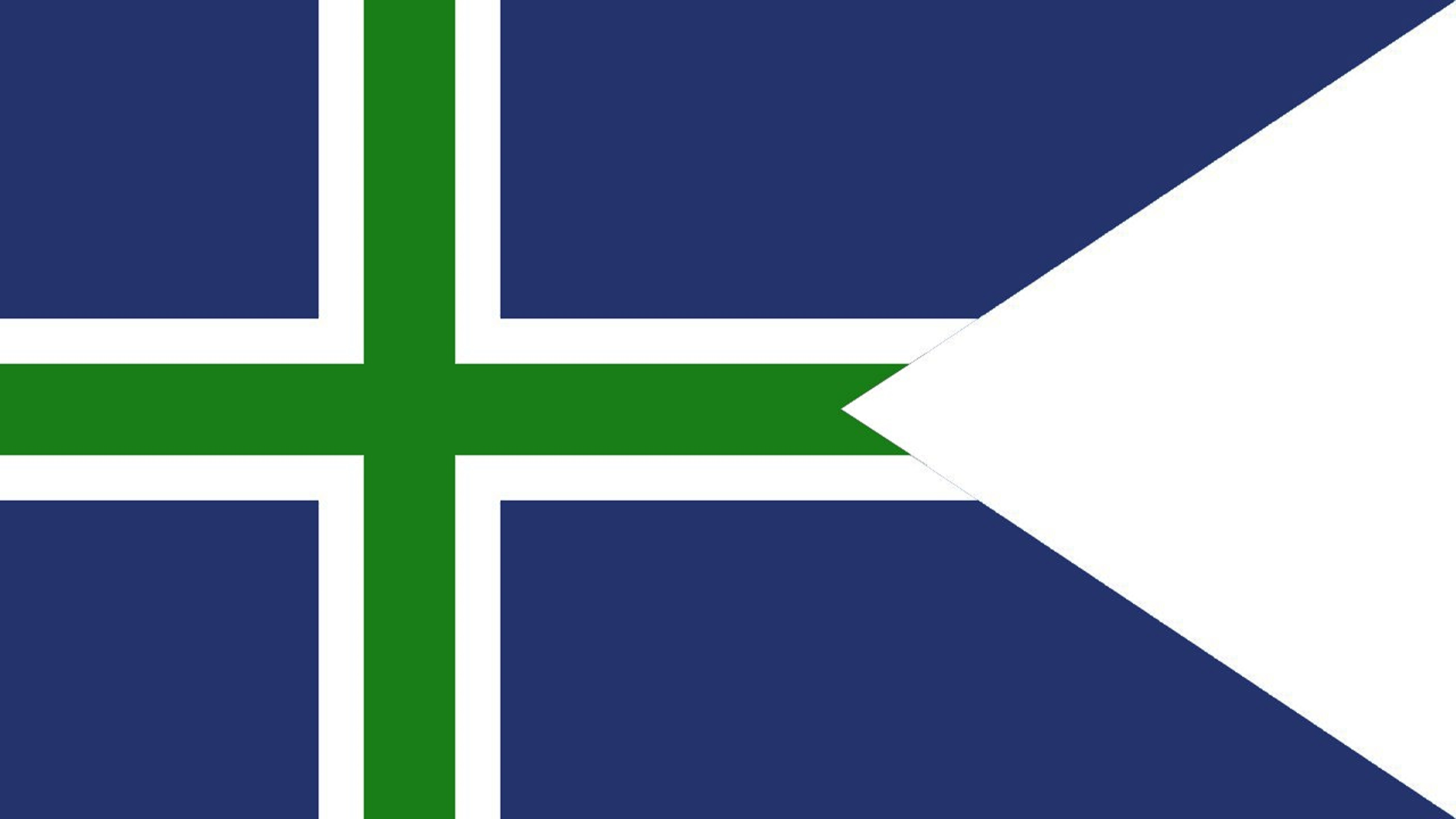 Неофициальный и альтернативный флаг Республики Коми. Впервые появился на митингах в Сыктывкаре в начале 2000х годов.